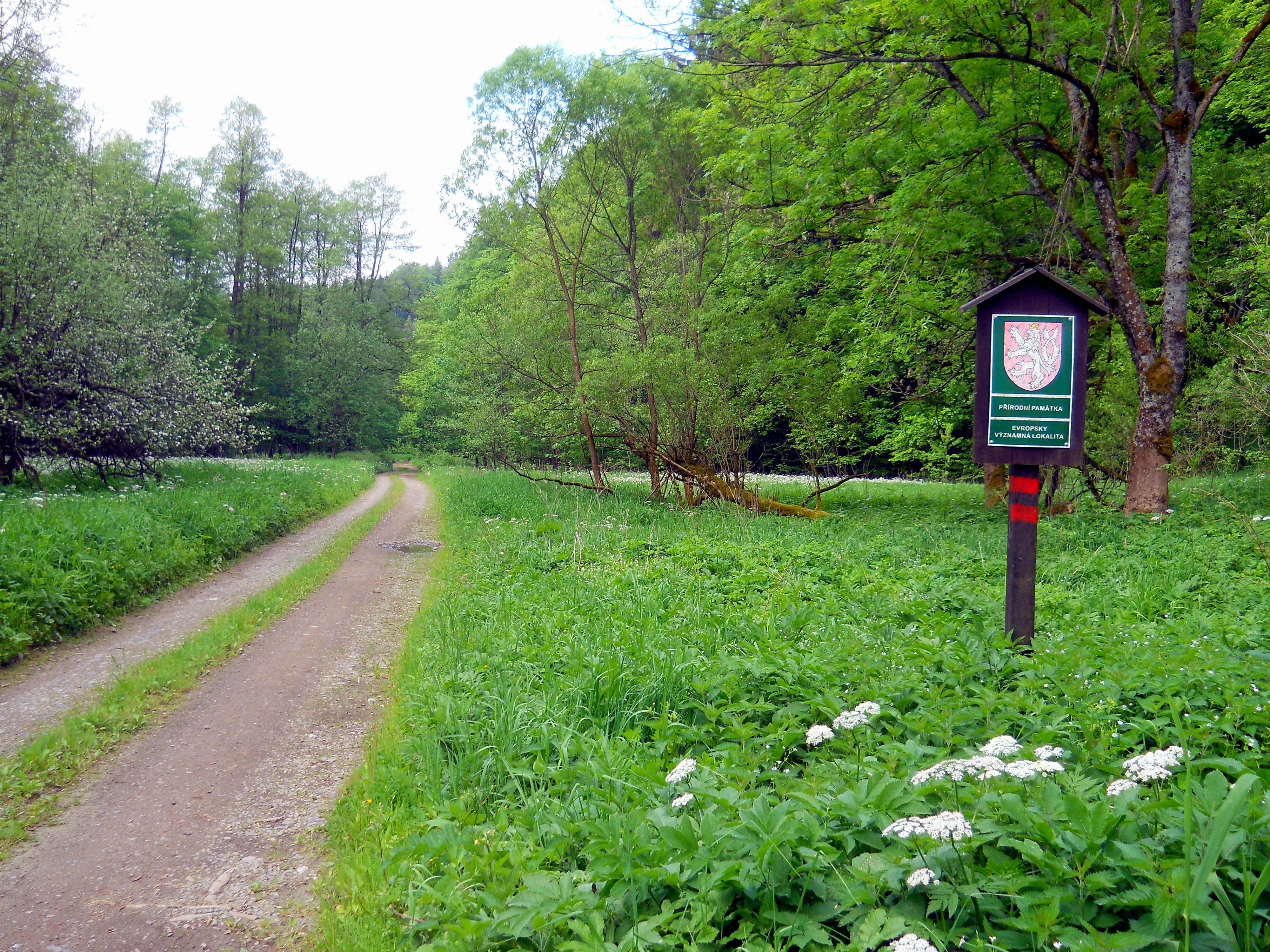 Celkový pohled.